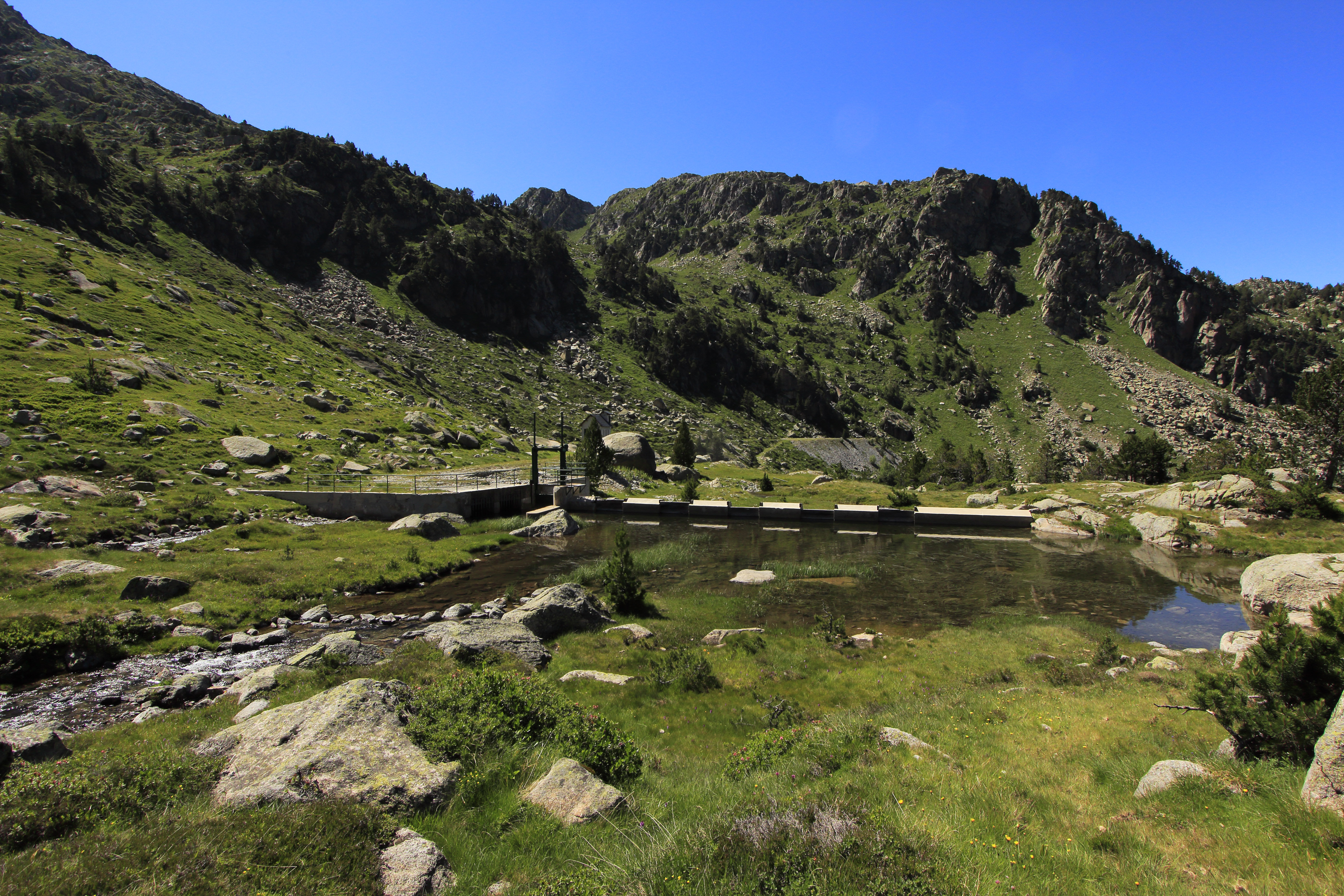 Resclosa de Saboredo de la Central Hidroelèctrica d'Arties (Vall d'Aran)